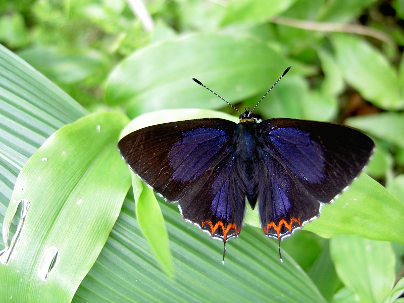 Heliophorus ila matsumurae（紅邊黃小灰蝶）, Male, Taipei, 2008.